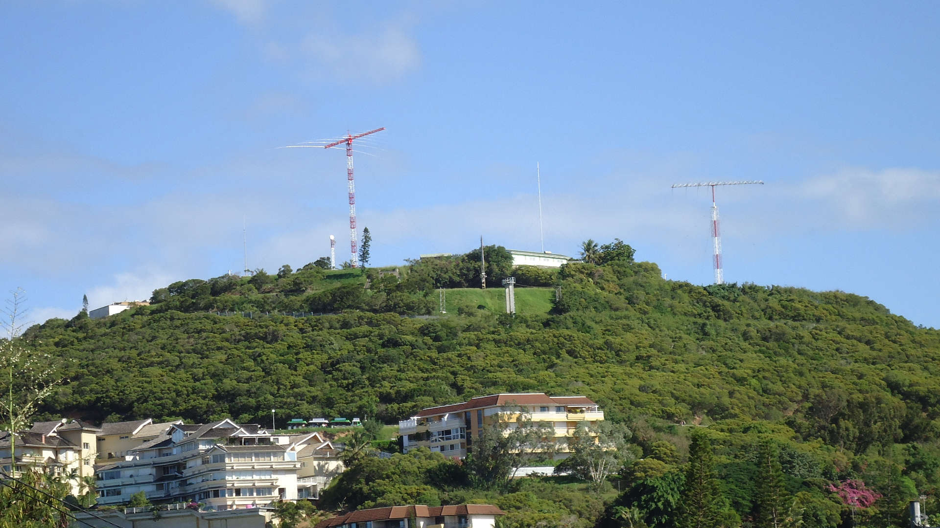 Antennes au sommet du mont du Ouen-Toro à Nouméa